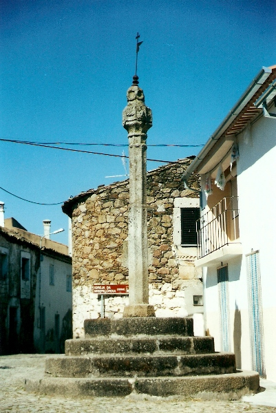 Pelourinho de Proença-a-Velha